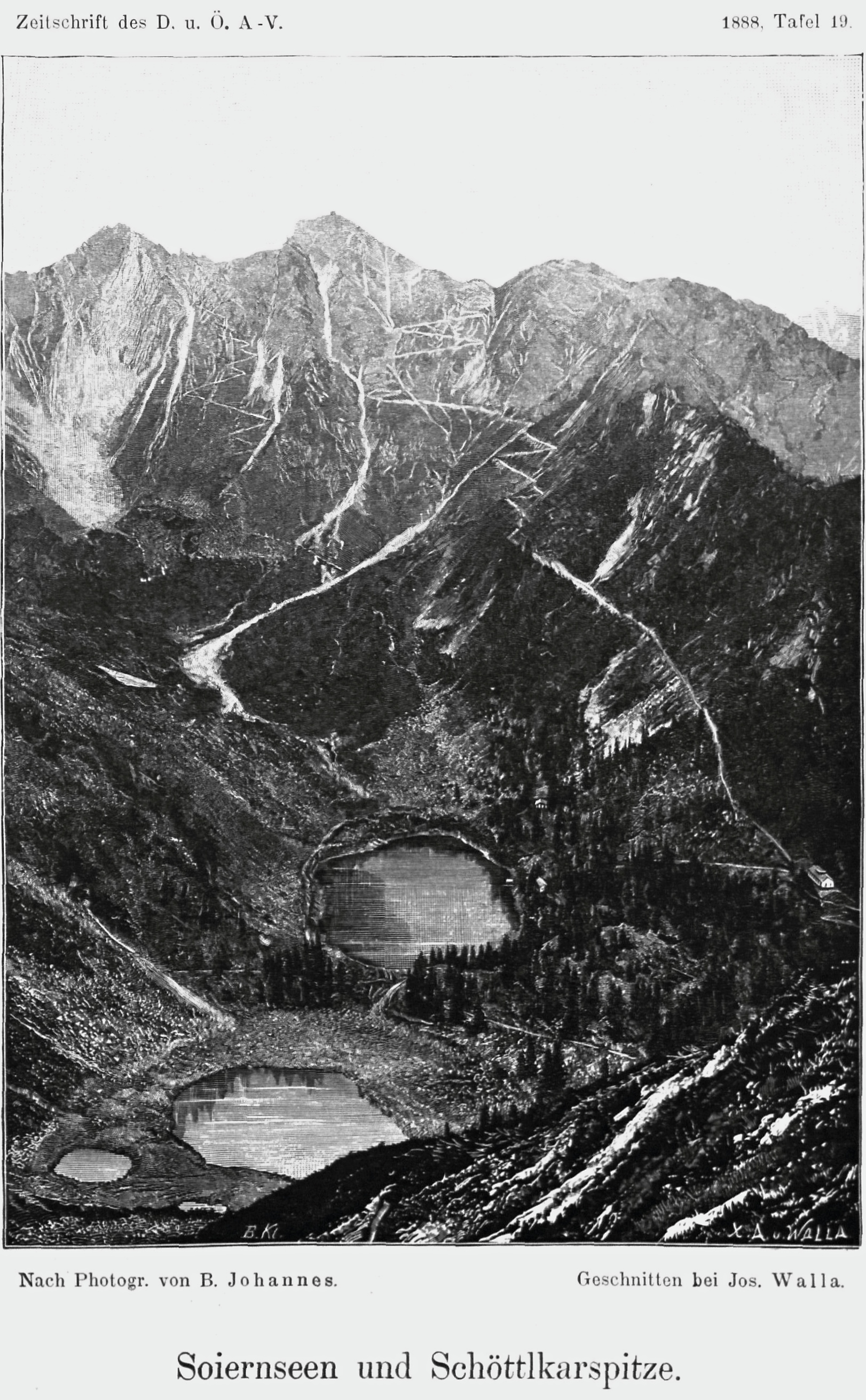 Soiernseen und Schöttlkarspitze aus Zeitschrift des Deutschen und Oesterreichischen Alpenvereins 1888 Band 19